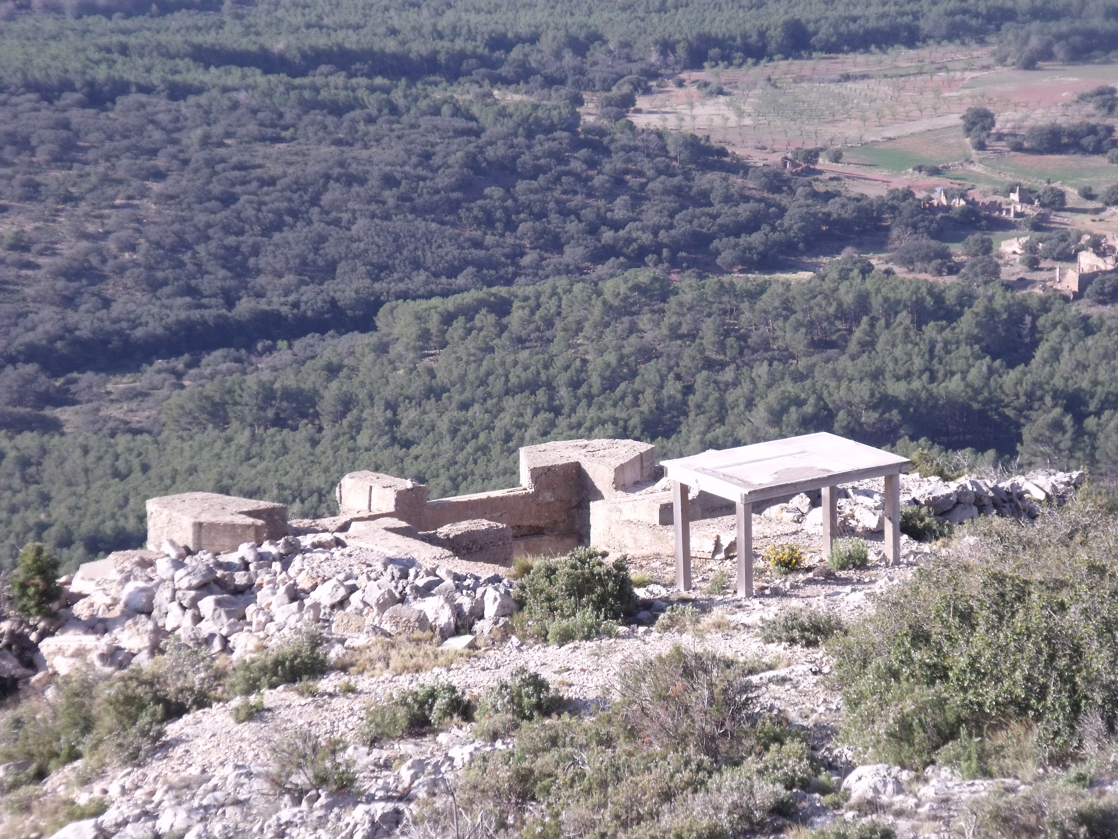 Exterior de uno de los restos del búnquer de observación del alto de Herragudo